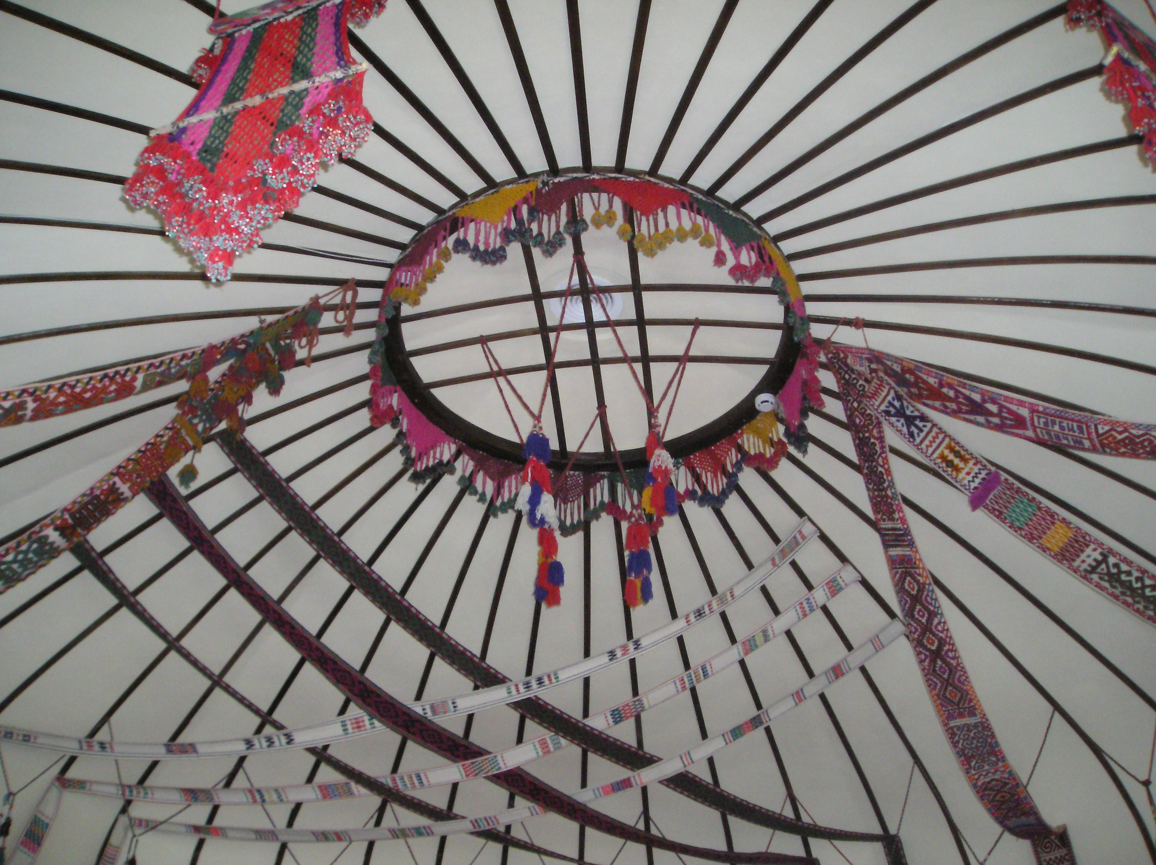 Шанырак (навершие юрты, жилища кочевых казахов) был семейной реликвией, символом продолжения рода. Он передвался из поколения в поколение. Символ шанырака - крест в круге -знак вечного движения в природе солнца, символ эволюции, развития жизни. Шанырак с одной стороны является границей между верхом и низом, с другой - между внешним и внутренним пространством. Через шанырак жители юрты связывались с сакральными небесными светилами: Солнцем, Луной и звездами. По окружности купольного круга шанырак подвешиваются разноцветные шерстяные шнуры аякбау с кистями на концах, с преобладением красного цвета, или треугольные подвесы тумарша с пуговицами, которые выполняли функции оберега.